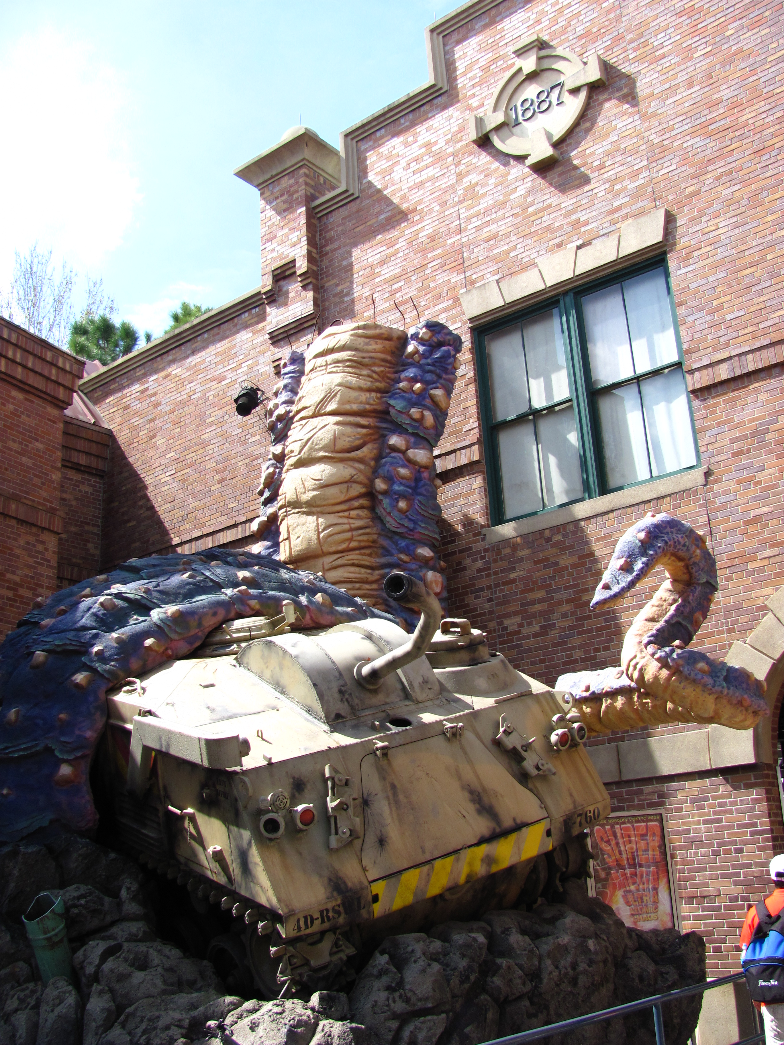 Disaster!